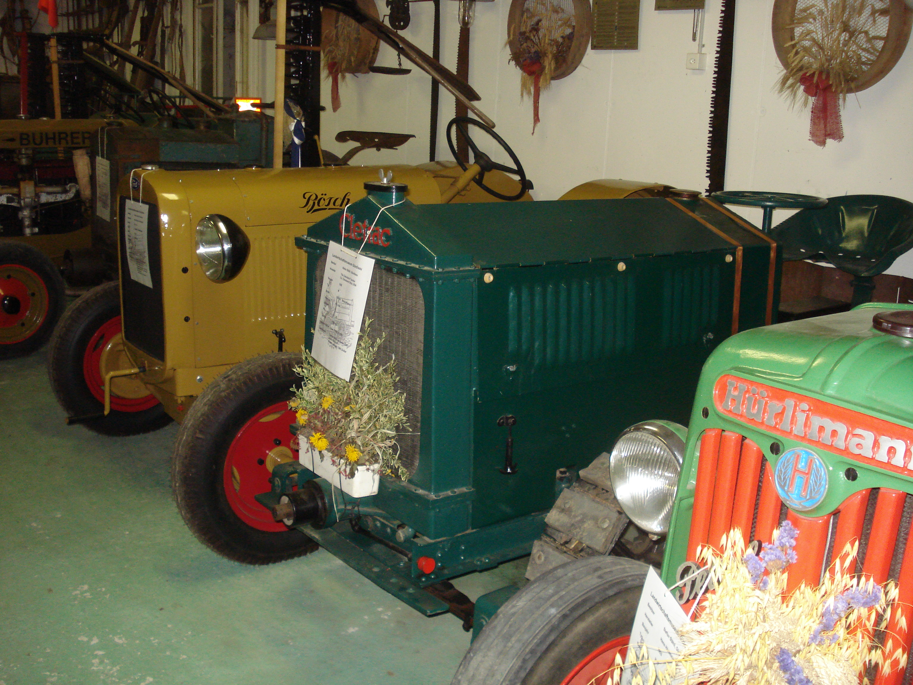 Das Museum Stefan Stähli befindet sich an der Dorfstrasse 3 in Gündisau, Russikon. Es zeigt Traktoren und diverse Handgeräte.